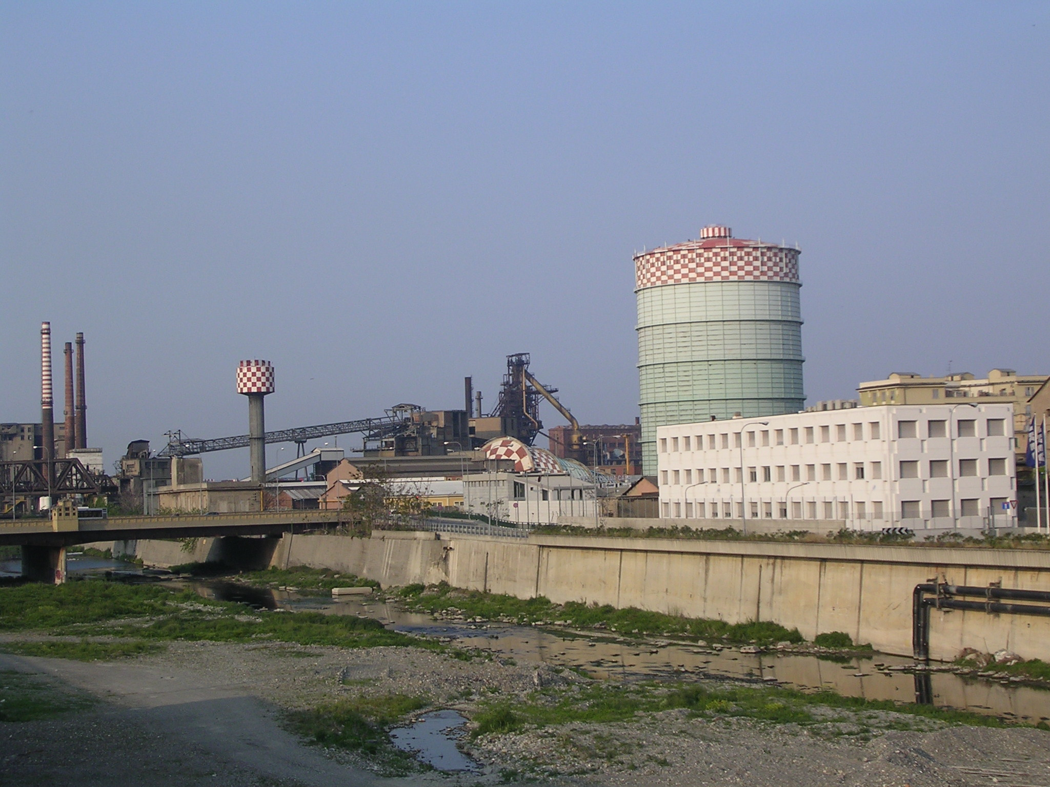 La sponda destra dela foce del Polcevera con l'acciaieria in demolizione